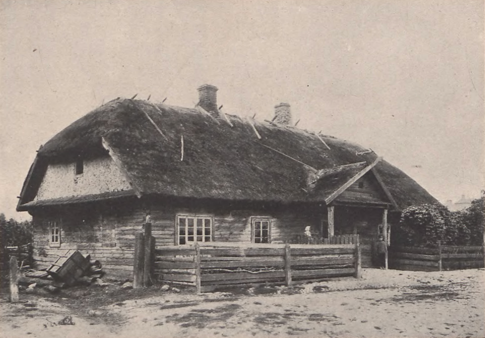 Беларуская (тарашкевіца): Поразаў (Porazaŭ), Крукі (Kruki) (?). Сядзіба